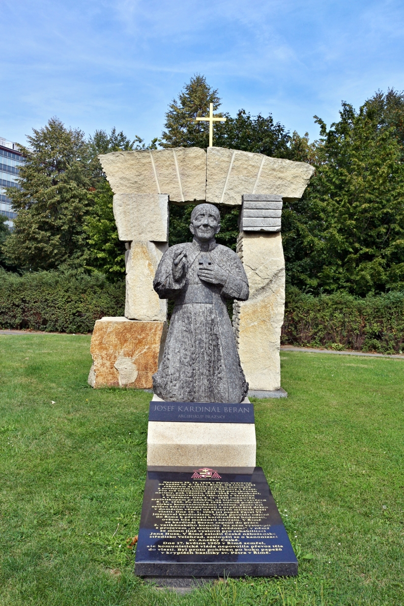 Praha-Dejvice socha kardinála Berana